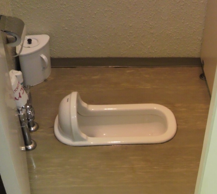 TOTO C75 NW1